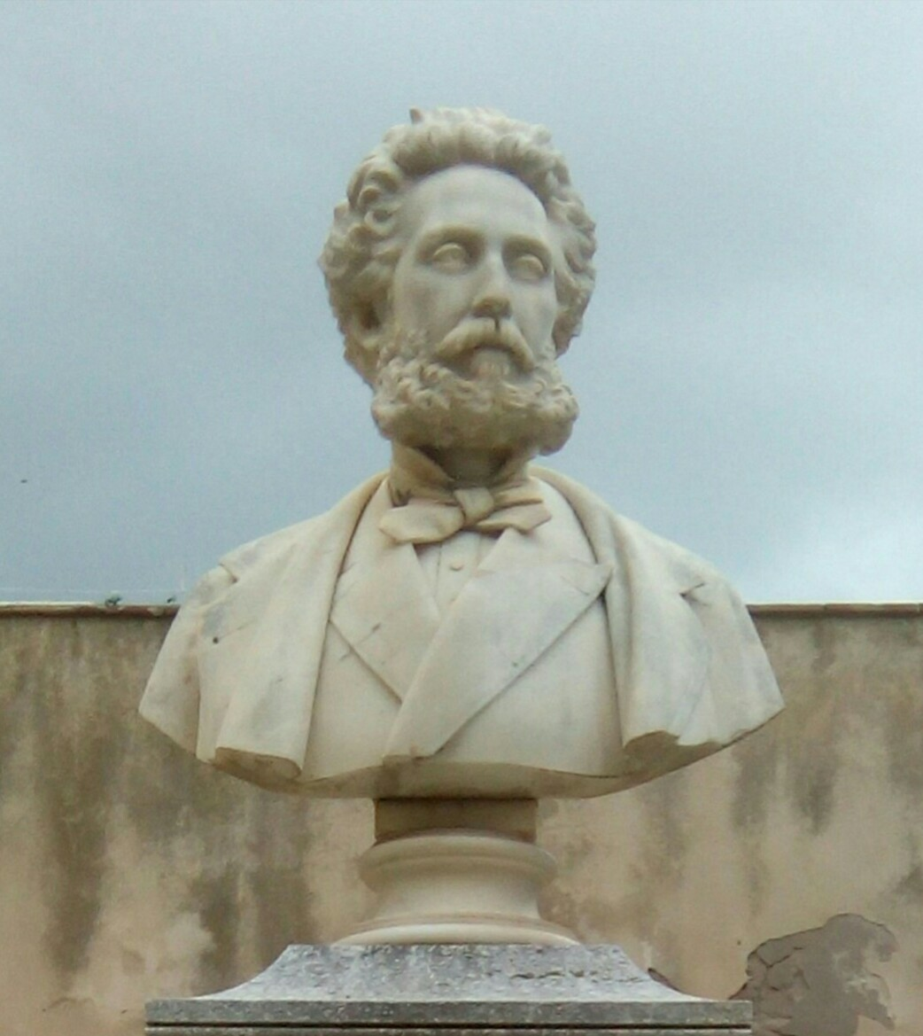 busto del conte Agostino Pepoli al museo Pepoli, Trapani